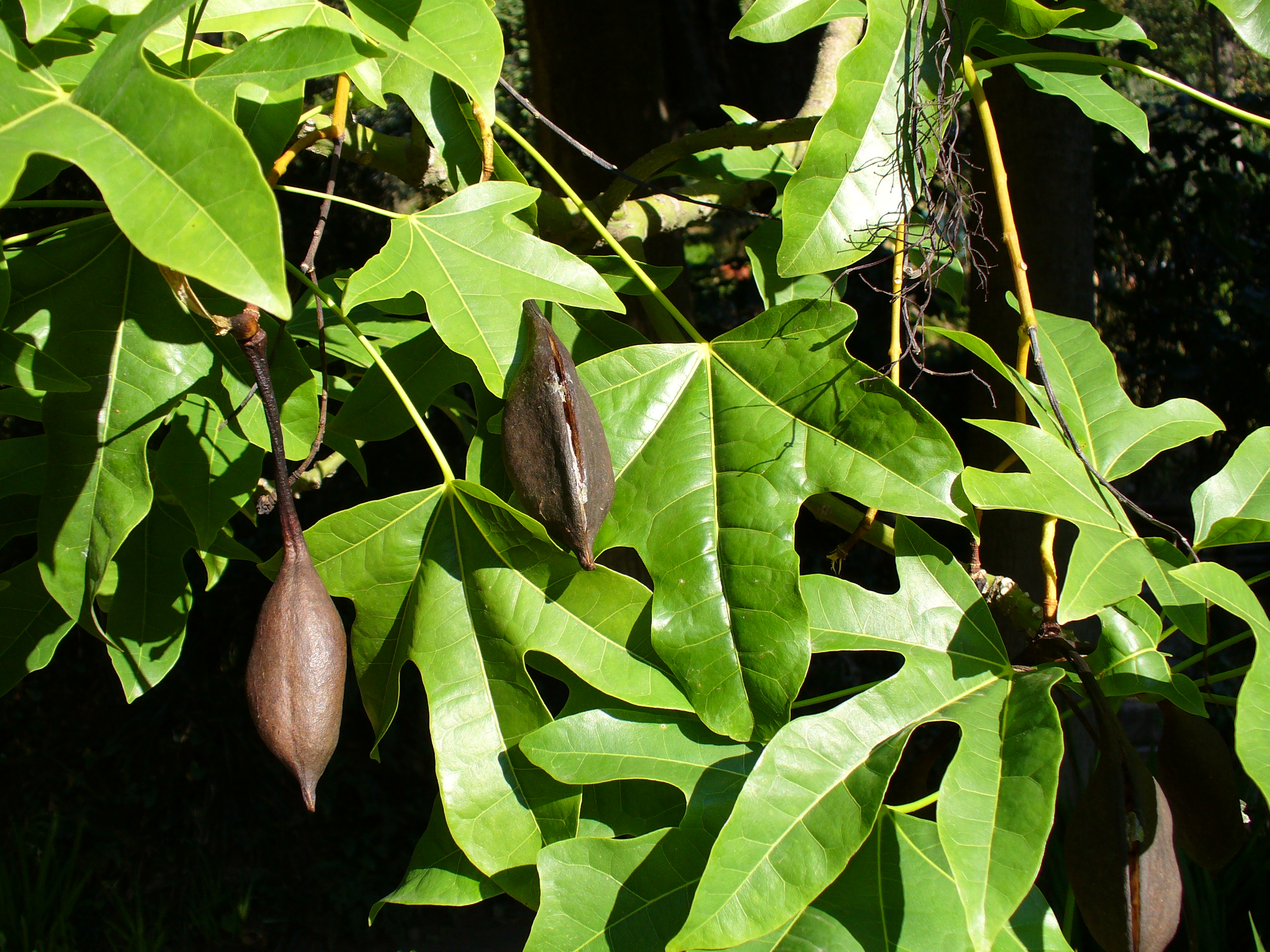 Jardin de la Madone à Menton